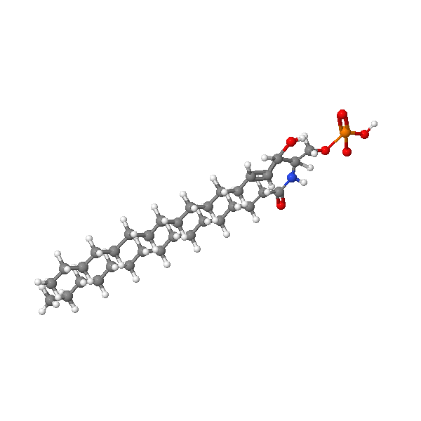 Ceramida-1-fosfat o C1P en 3D on els carbonis estan representats de color gris, el hidrògens de blanc, els oxígens de vermell, el fosfat de taronja i el nitrogen de blau.